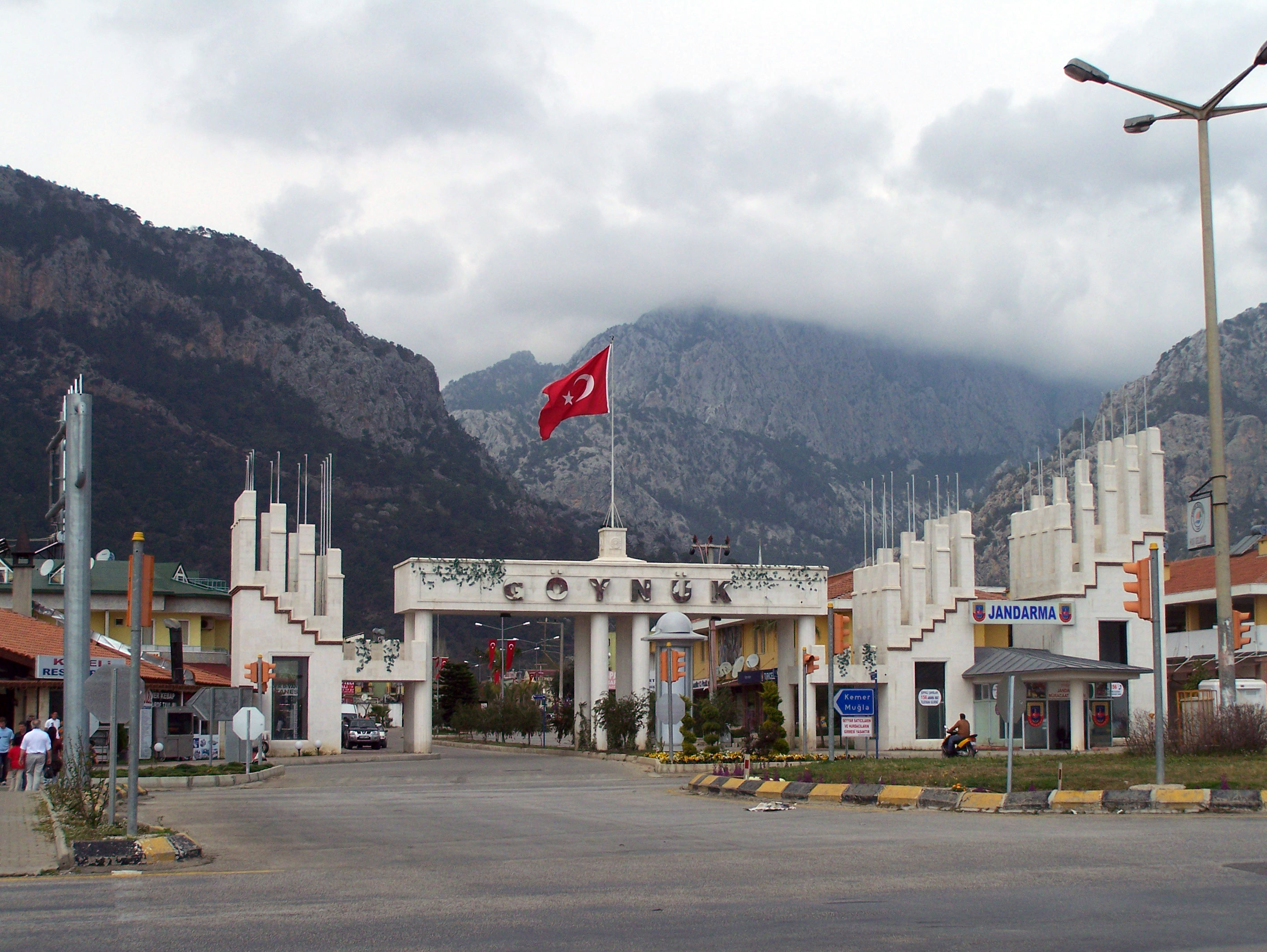 Entrance of Göynök, Turkey (near Antalya)